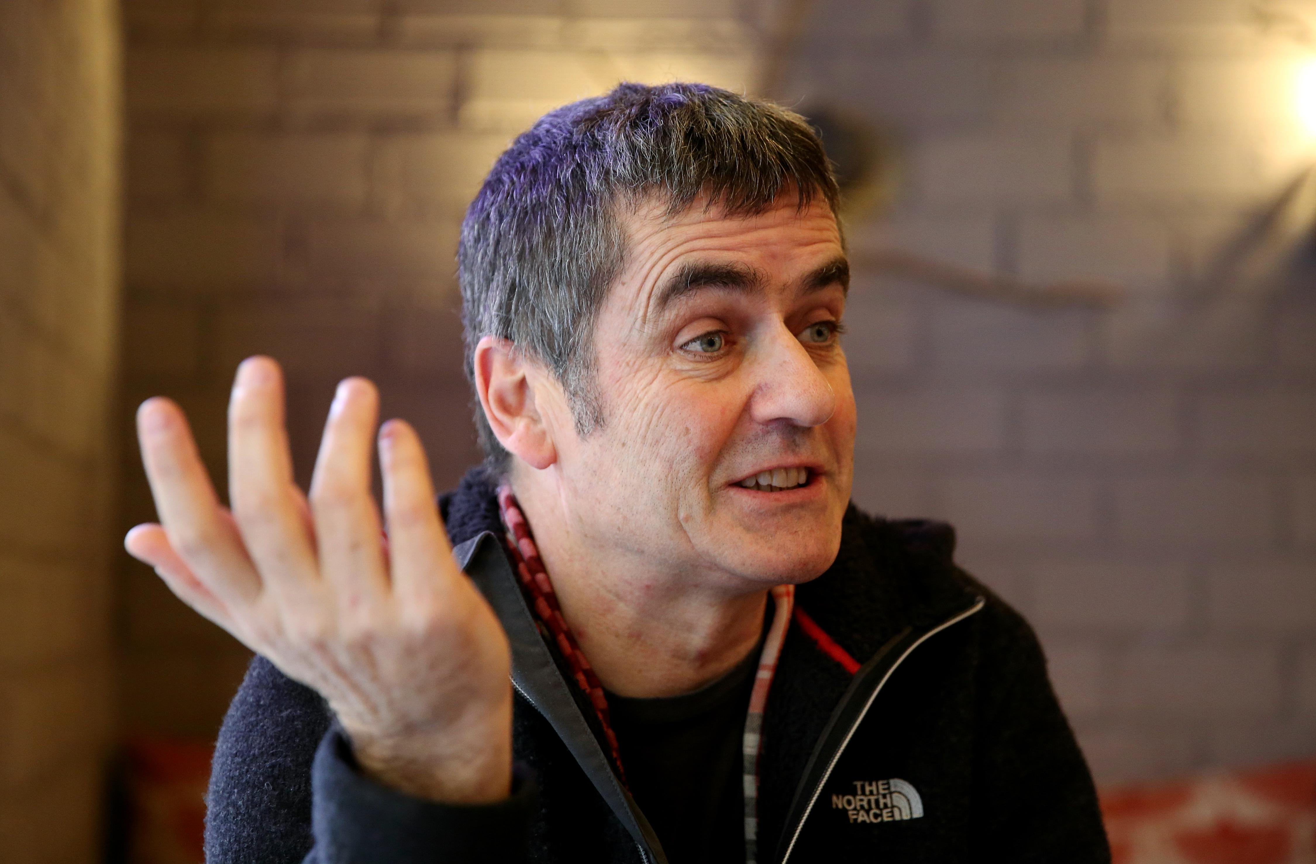 “Cuando muere Isabel se rompe España, si quieres expresarlo así, pero tampoco estaba tan unida como para decirlo. Castilla y Aragón eran dos coronas que se unen en un matrimonio y cuando una parte de ese matrimonio desaparece, desaparece también la unión”. “El problema es tener que poner una fecha de cuando empieza España, porque no la tiene, es un procés, un proceso. Empieza con ella y luego se rompe. ¿Cuándo arranca lo que es España? Tal vez cuando Fernando se anexa Navarra”. “A lo mejor el milagro de España también es este, que tiene una elasticidad emocional que le permite este tipo de bandazos, pasar del pesimismo al optimismo, lo que lo convertiría en un país tolerante”